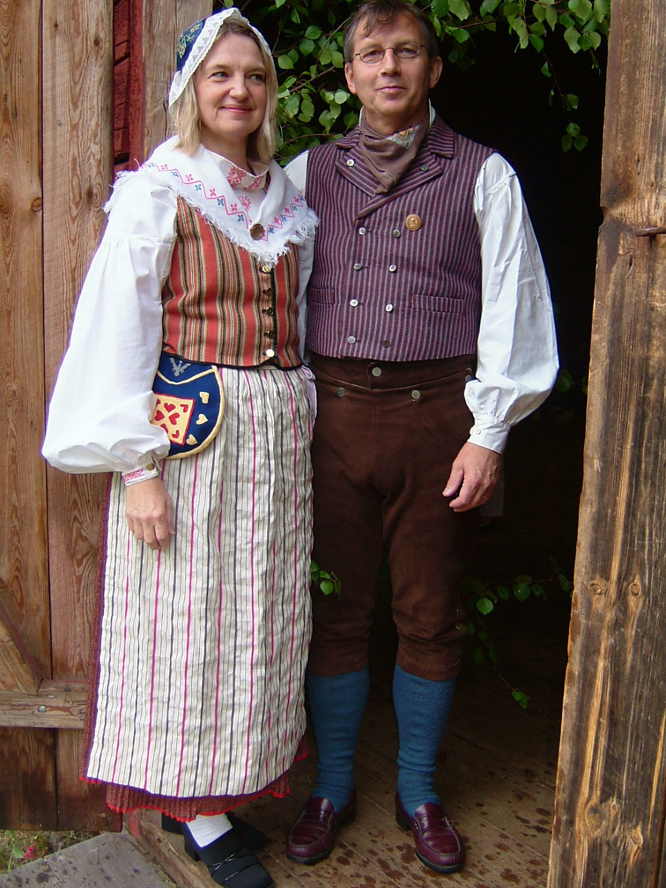 Österfärnebos mans- och kvinnodräkt